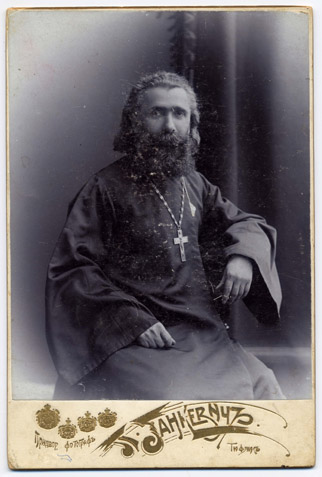 კალისტრატე ცინცაძე 1910 წელს